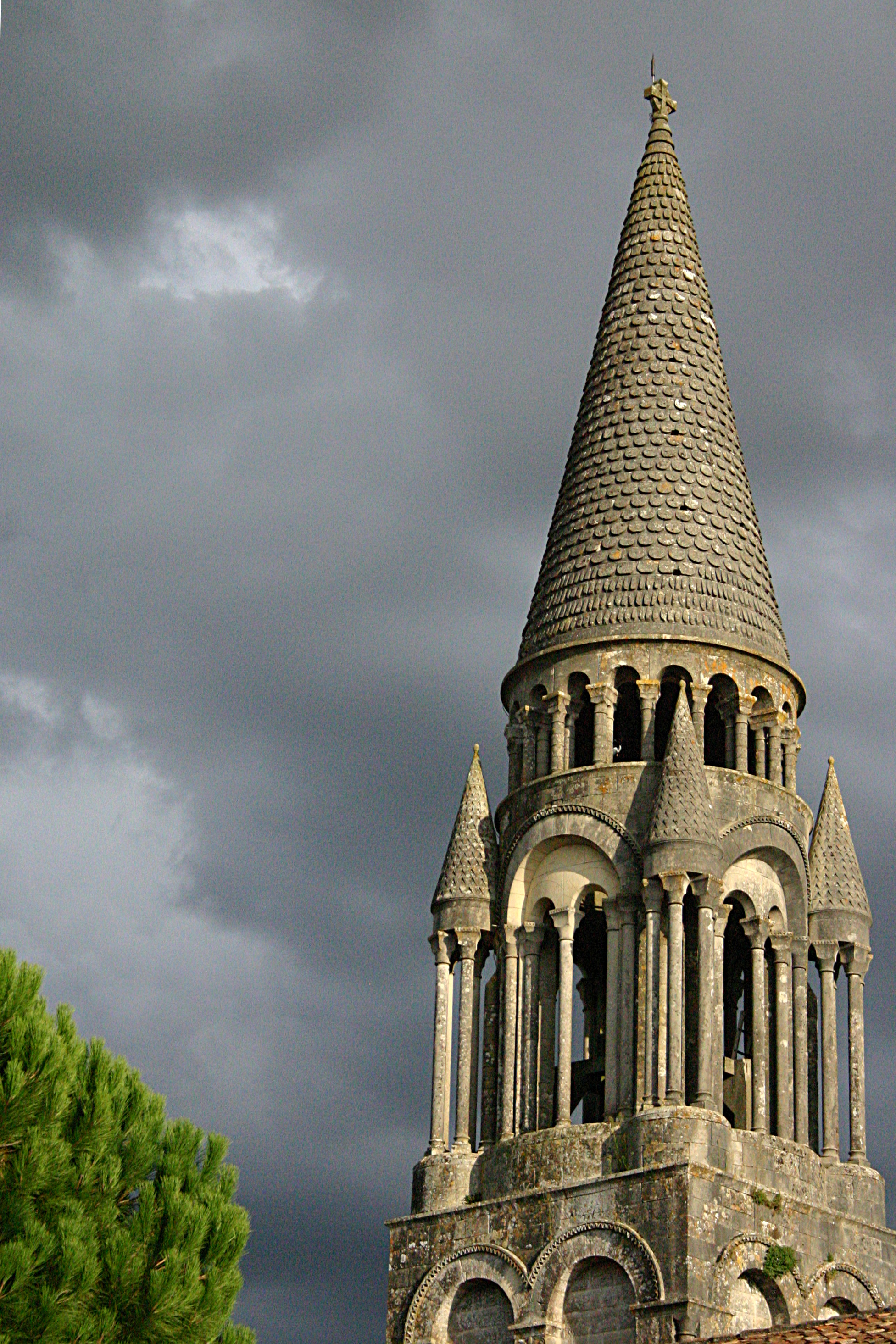 Détail du clocher de l'Église Notre-Dame de l'Assomption de Fenioux .